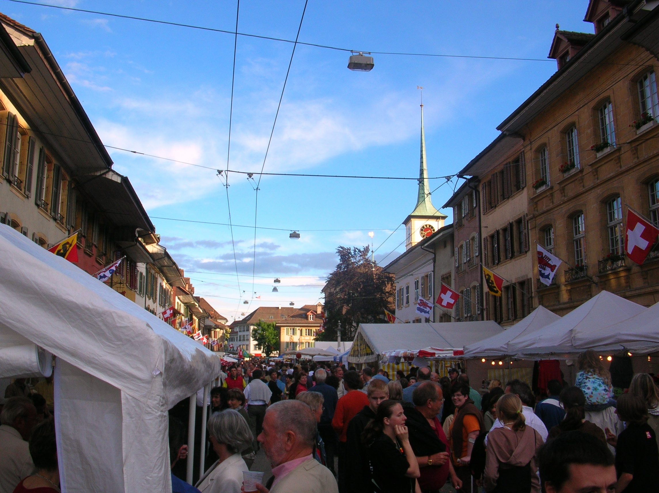 Stedlifest Nidau